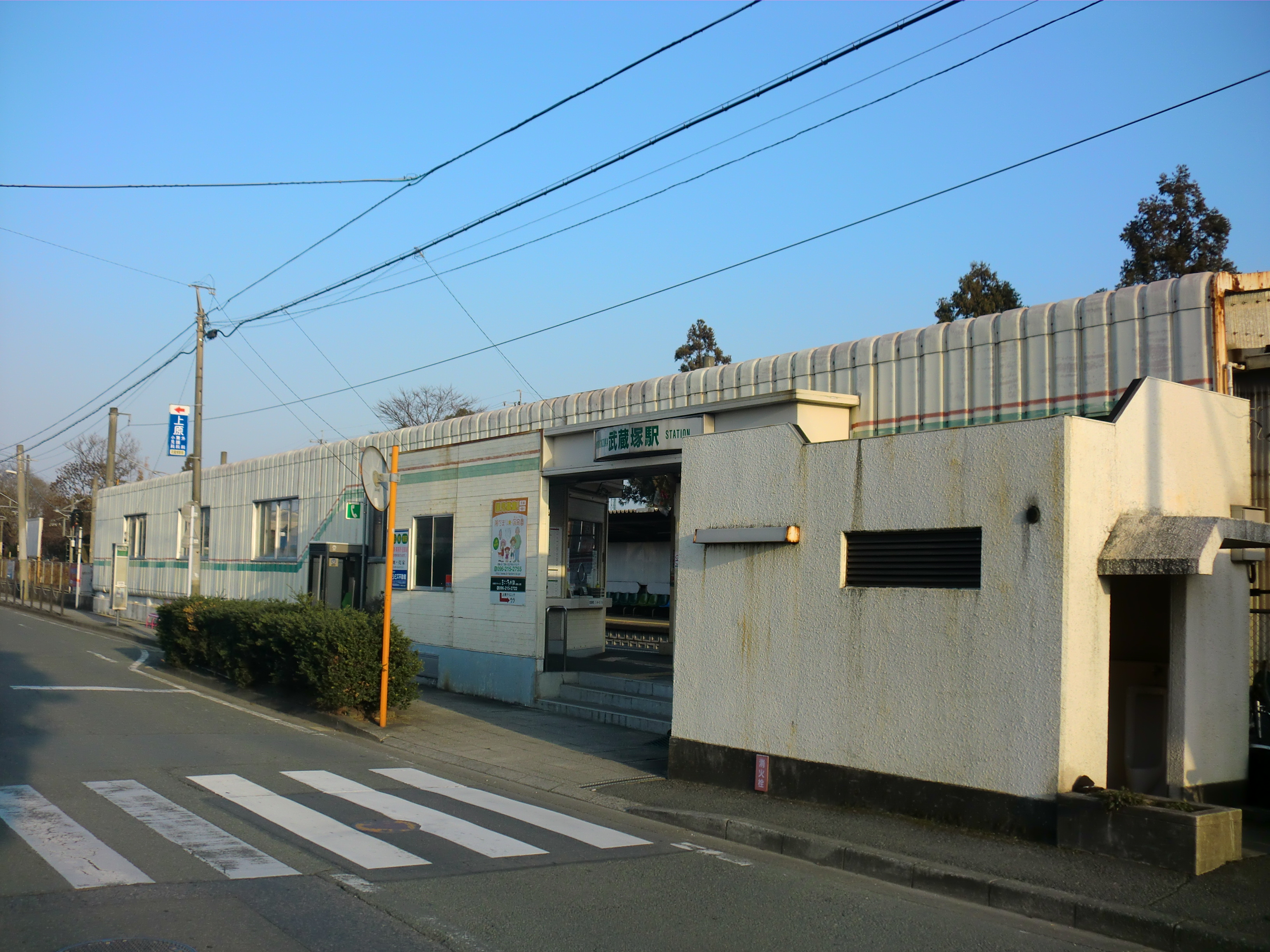 JR武蔵塚（むさしづか）駅駅舎